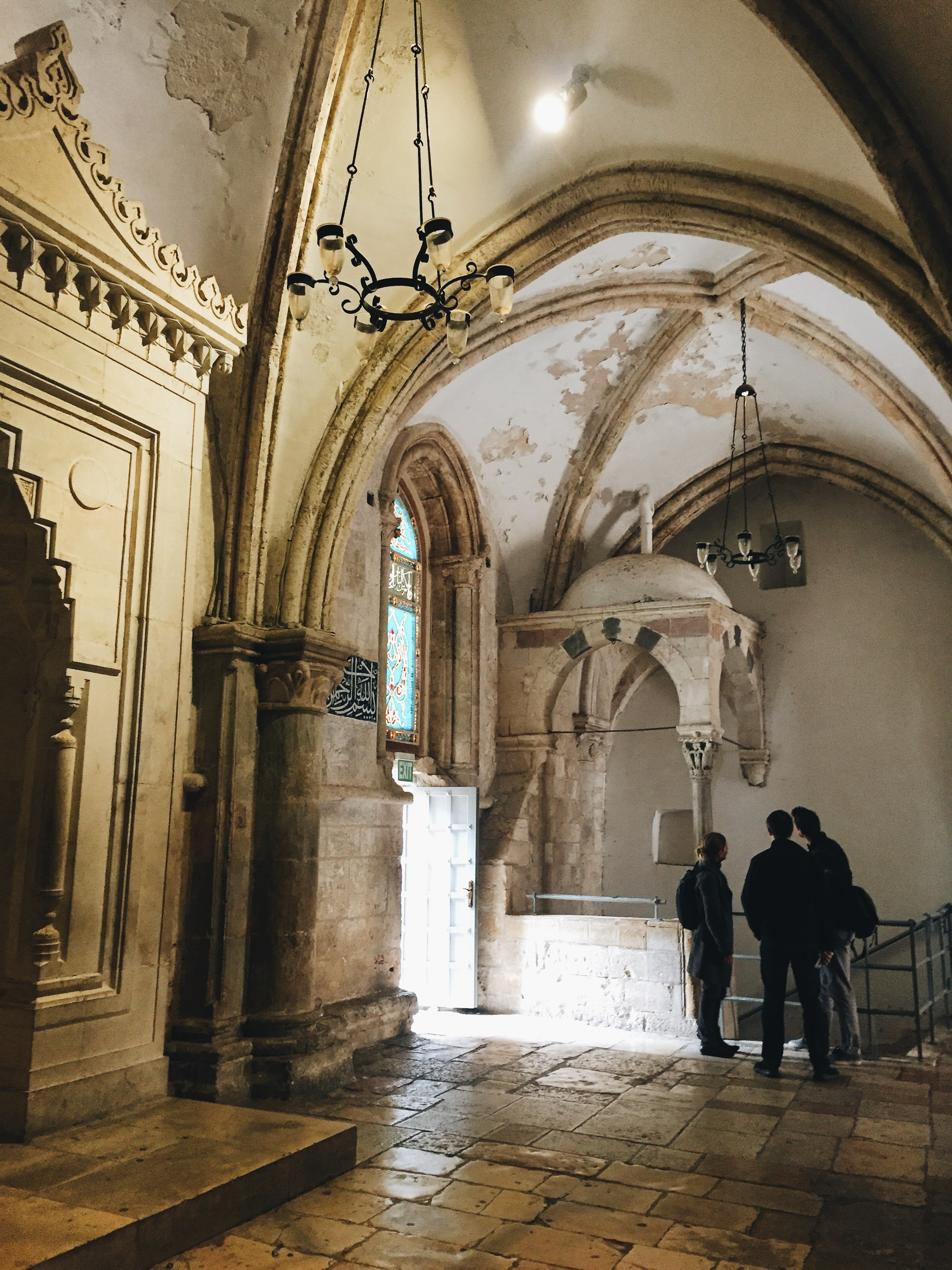 מכלול מבנים מקודשים שהיה מוקף בחומה החל מהתקופה ההלניסטית. במכלול המבנים נכלל "אולם הסעודה האחרונה", "קבר דוד המלך", "שער האיסיים", "כנסיית הדורמציון", "סנט פטר גליקנטו"